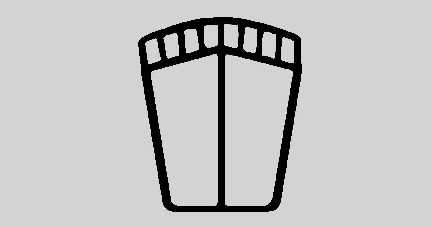 Typologie der podomorphen Petrosomatoglyphen auf Lanzarote nach Hans-Joachim Ulbrich